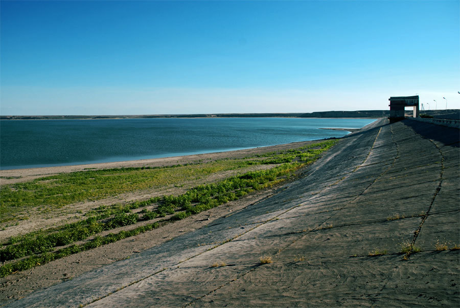 Тасуткельское вдх